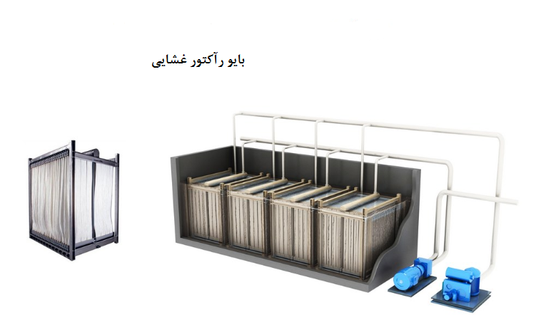 این تصویر نشان دهنده ی یک بایو راکتور غشایی مورد استفاده در تصفیه آب میباشد .